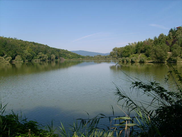 Malomvölgyi-tó (Pécs, Baranya megye, Magyarország)